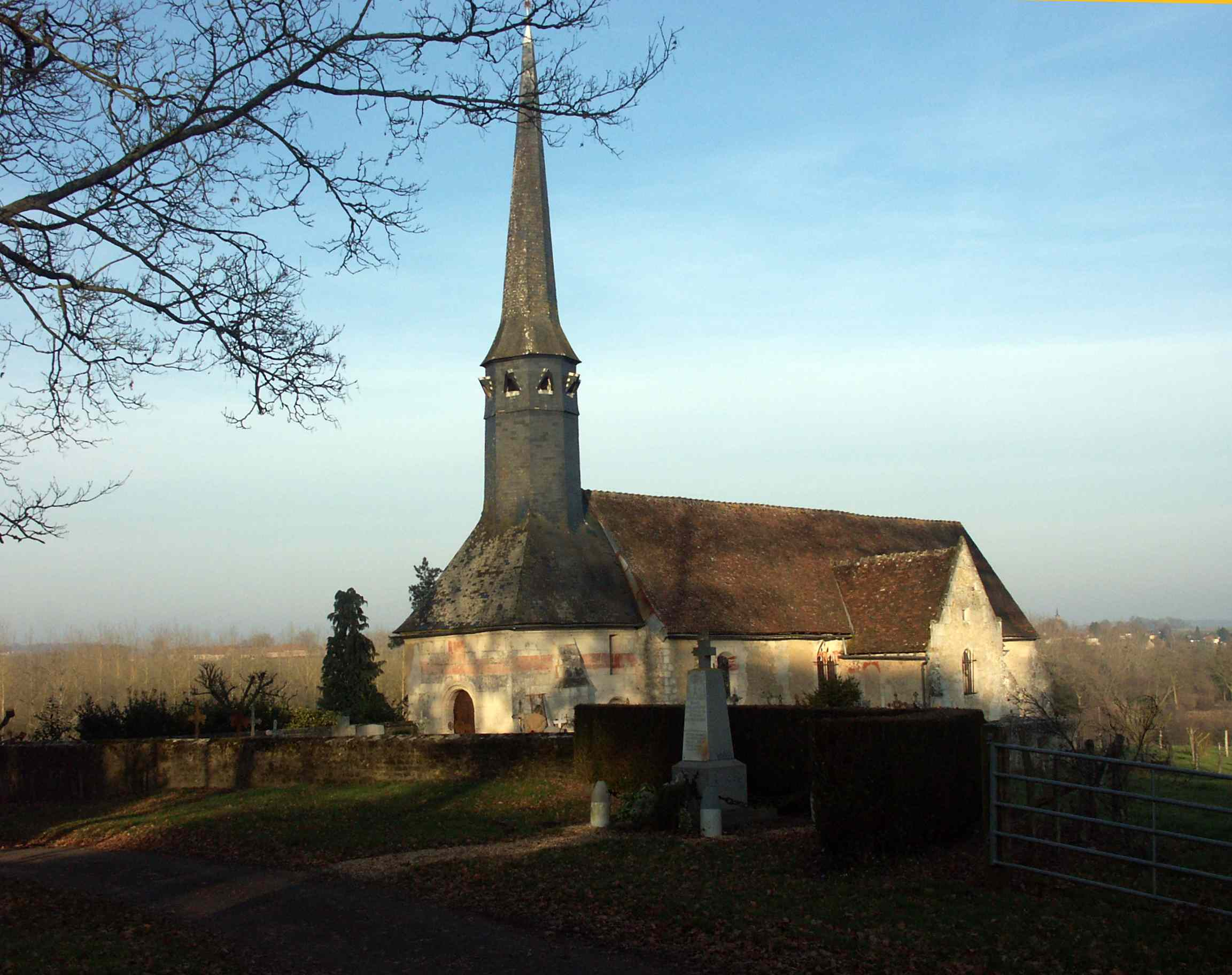 Nef romane 12e, choeur et tour-porche 16e ; chevet plat. Vue du sud. Classée MH 2004.